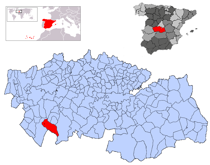 Robledo del Mazo la provincia de Toledo